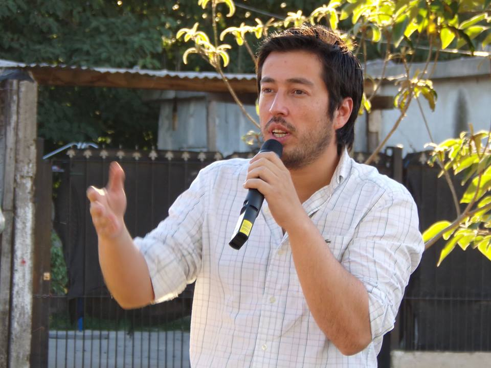 Recorriendo las calles de Grand Bourg